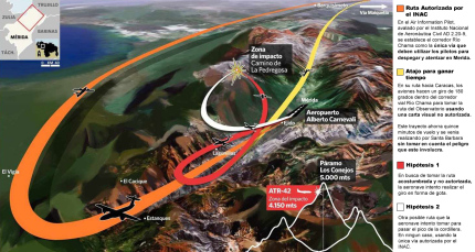 via segura a Caracas fue convertida en una via a la desgracia